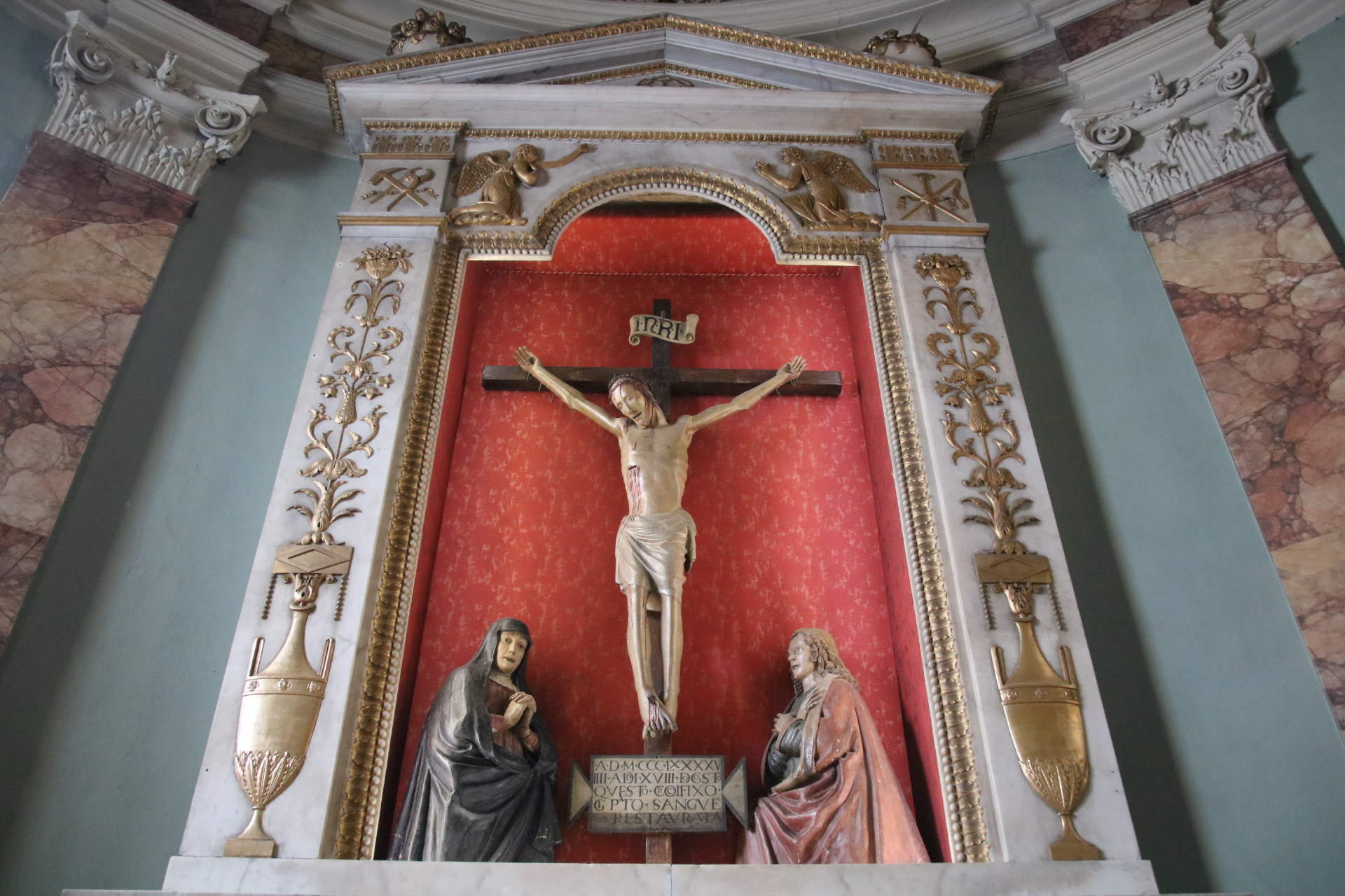 Santuario del Santissimo Crocifisso (Borgo a Buggiano)